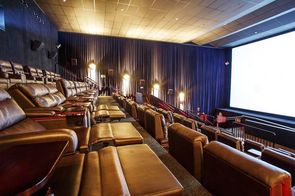 Sala VIP do Cineflix do Aurora Shopping, de Londrina